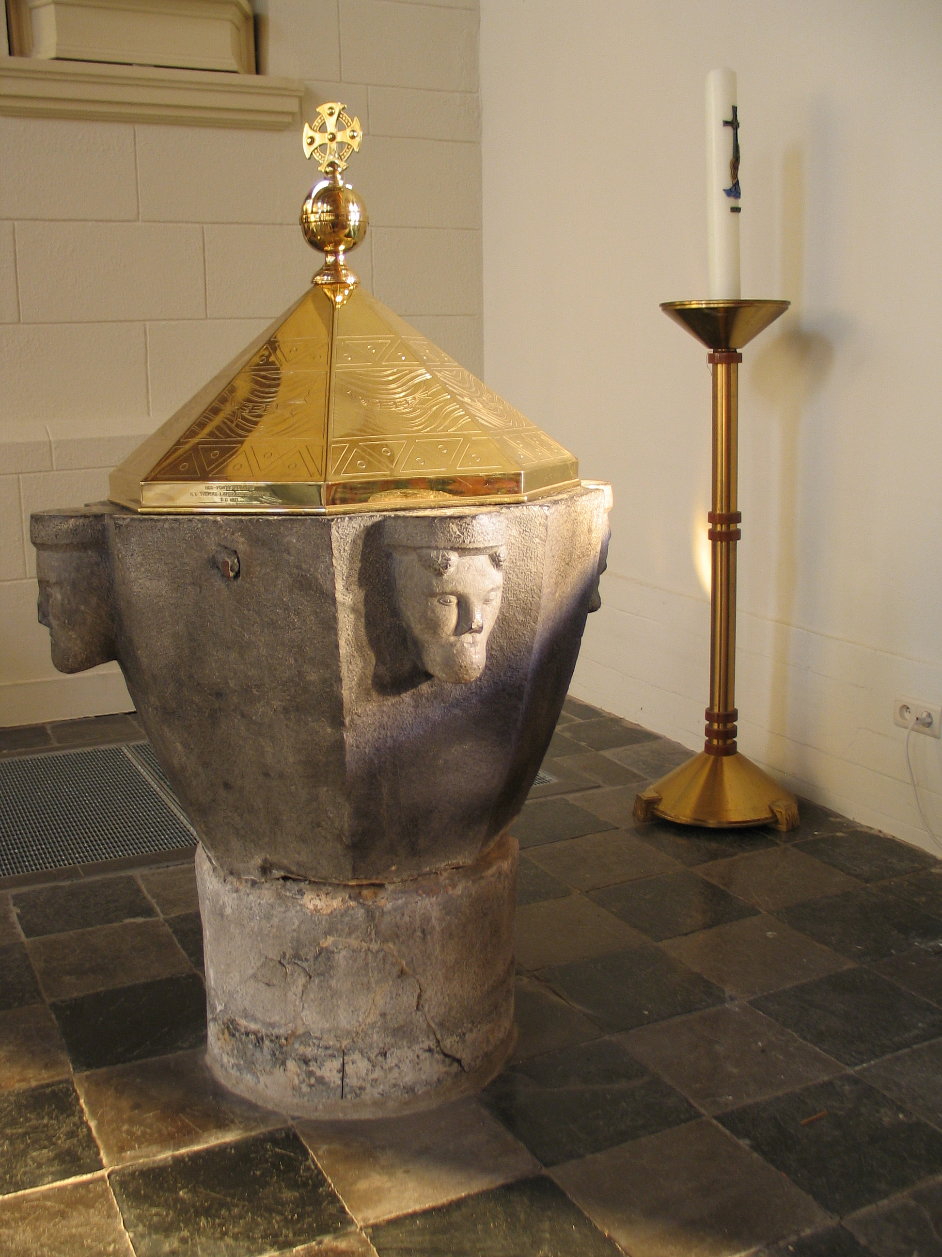 doopvont in de Sint-Stephanuskerk te Hoeselt, België - vroeggotisch - uit ca. 1250 - baptismal font